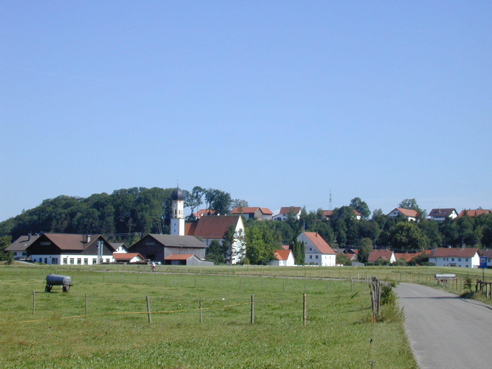 Kinsau, Bavaria, Germany, Public Domain, Picture from Alexander Heger in July 2006